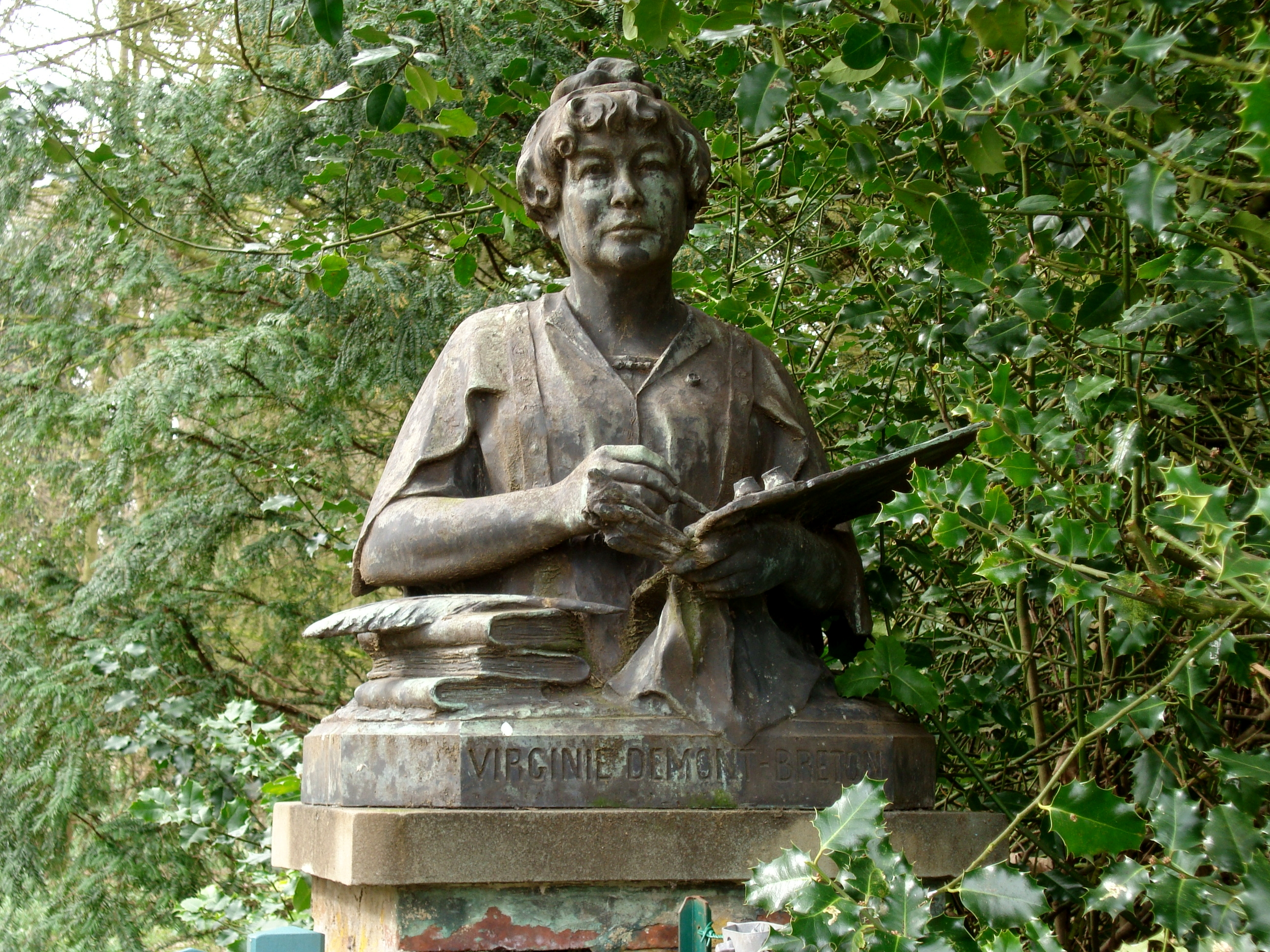 Buste du peintre Virginie Demont-Breton à Wissant (Pas-de-Calais).